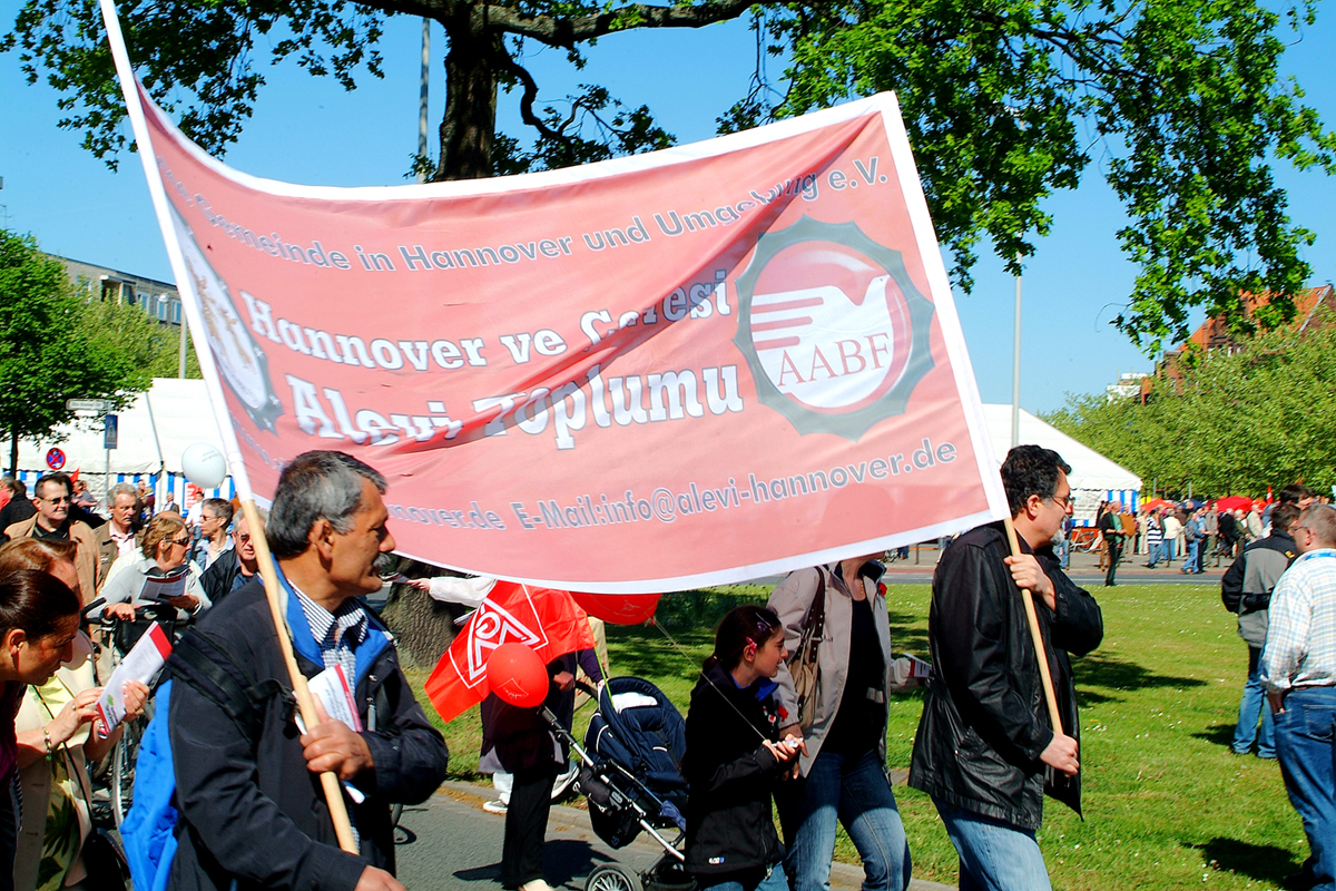 Erste Auswahl nachbearbeiteter Fotos von Arbeiten, Aktionen und Geschehenissen vom 1. Mai 2011 in Hannover rund um den Klagesmarkt. Sollten Sie weiterführende Bilder oder gar historische Dokumente besitzen, bitten wir höflich um Ihre Ergänzung.